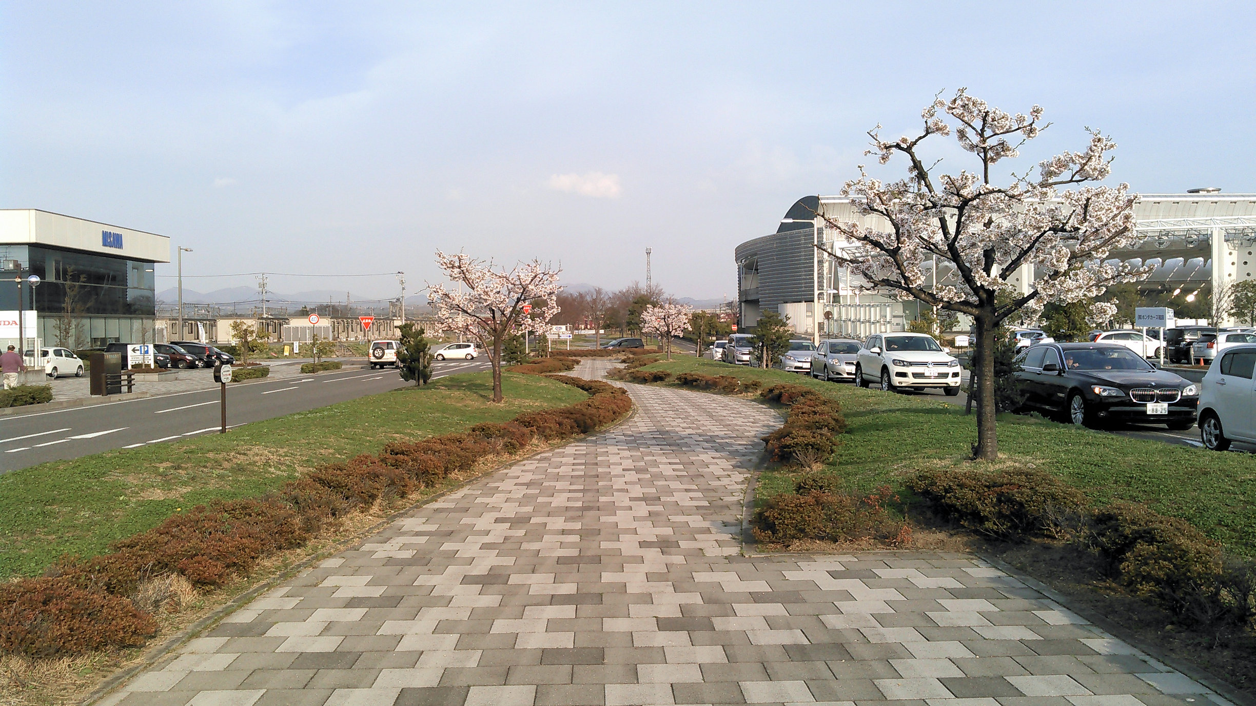 郡山市 郡山南拠点の50m道路(郡山南中央線)